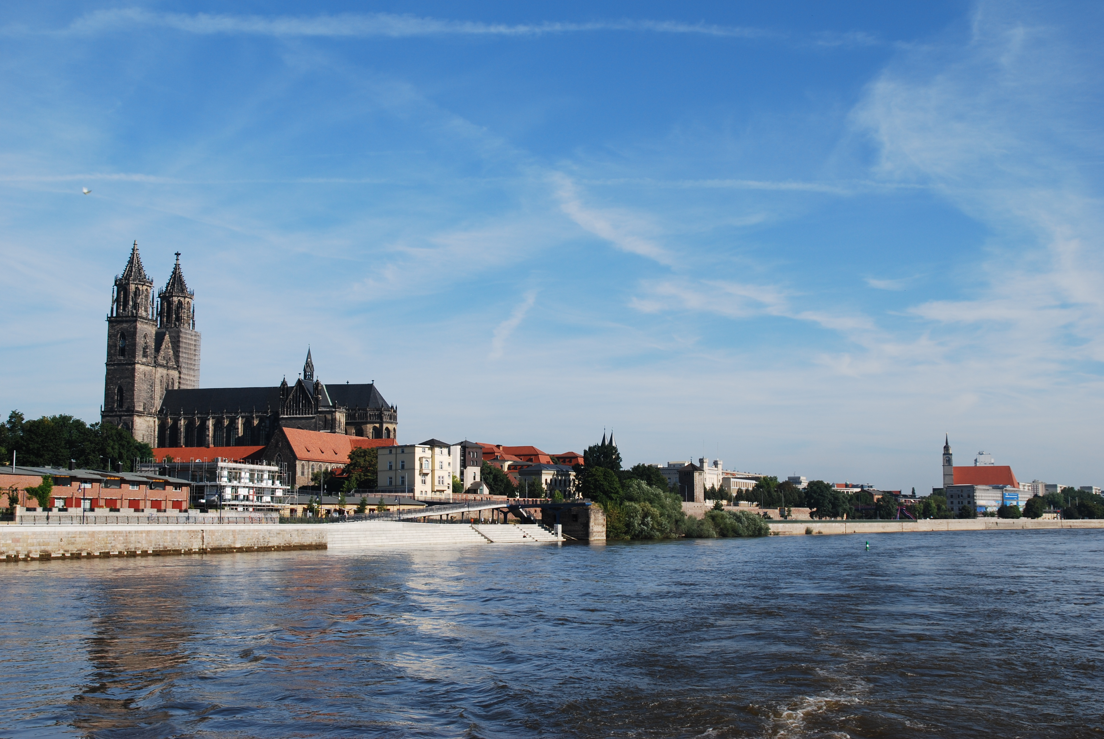 Elbuferpanorama Magdeburg